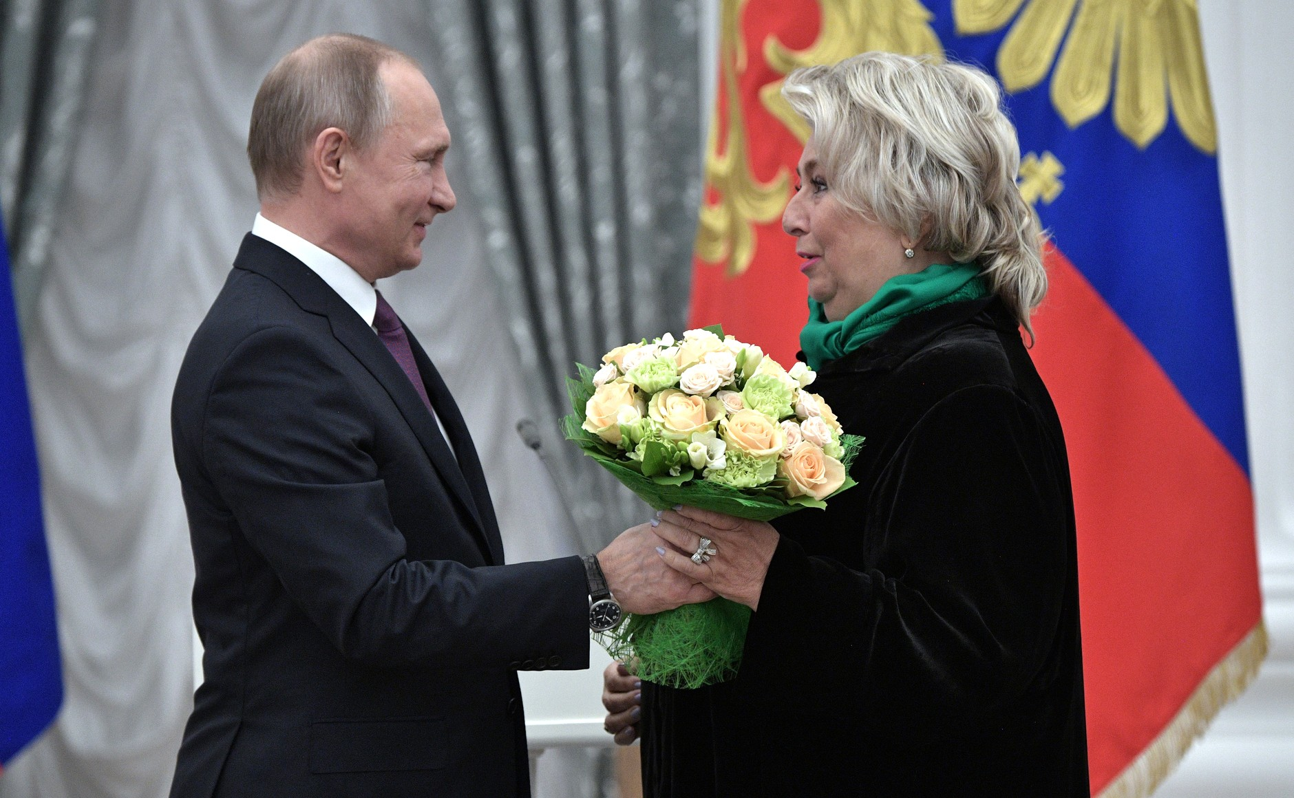 На церемонии вручения государственных наград. Орденом «За заслуги перед Отечеством» IV степени награждена Татьяна Тарасова – старший тренер спортивной сборной команды России по фигурному катанию